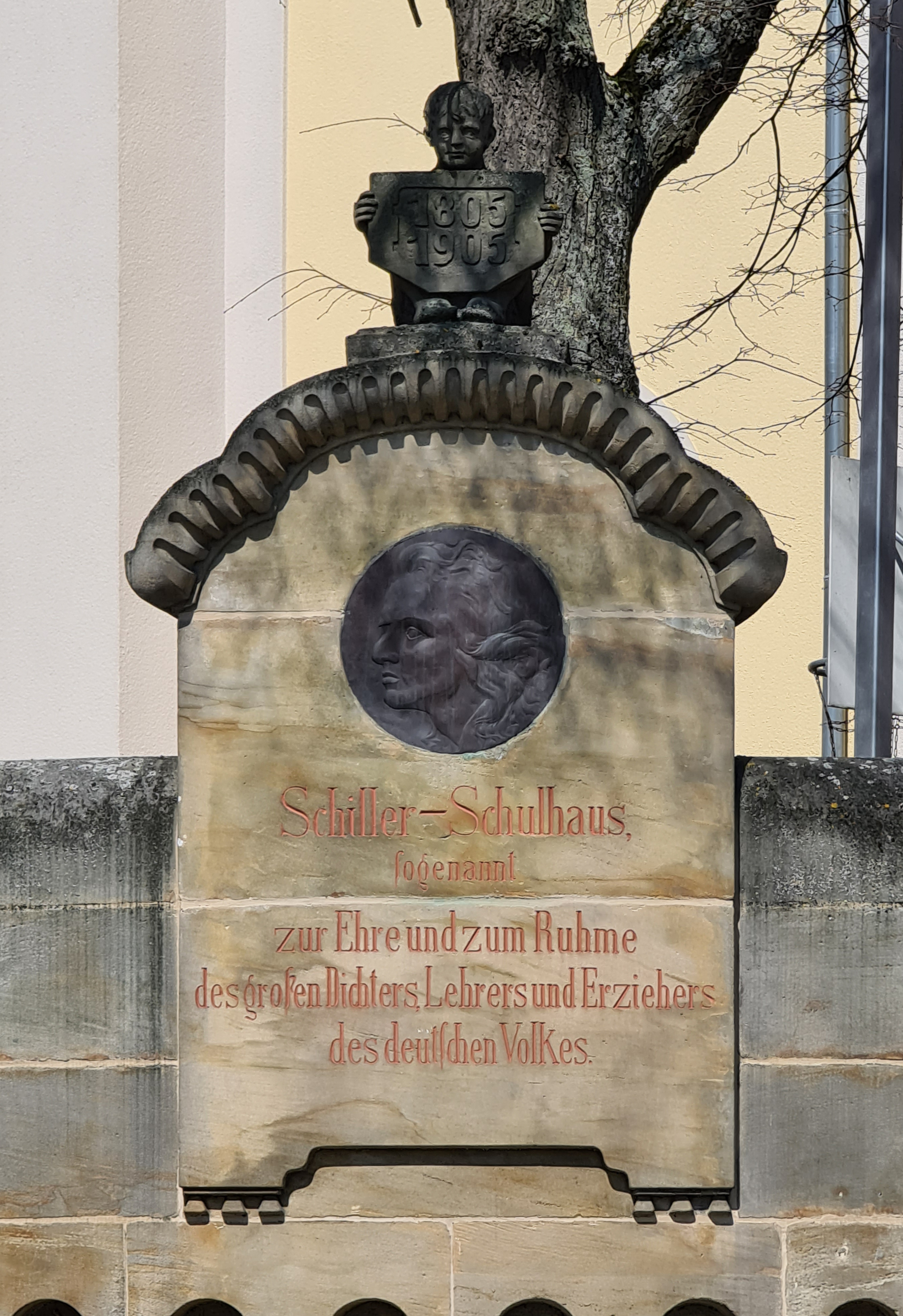 Die Schiller-Gedenktafel an der Mauer des Schiller-Gymnasiums Hof.